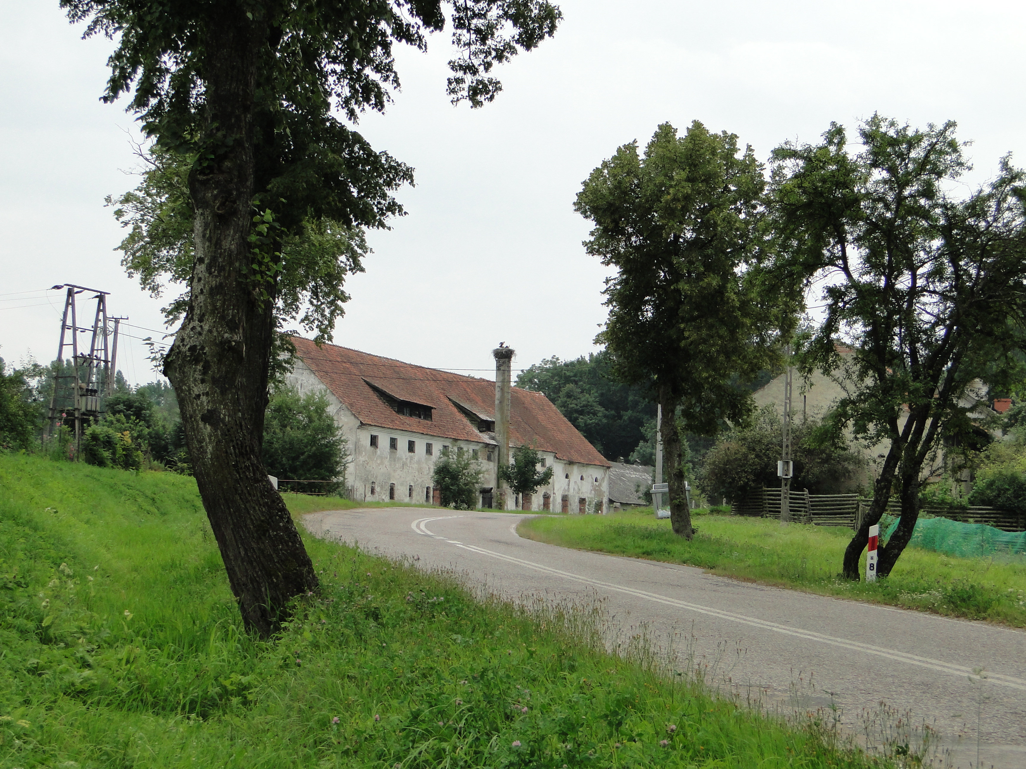 Klimki. Budynki dawnych magazynów.